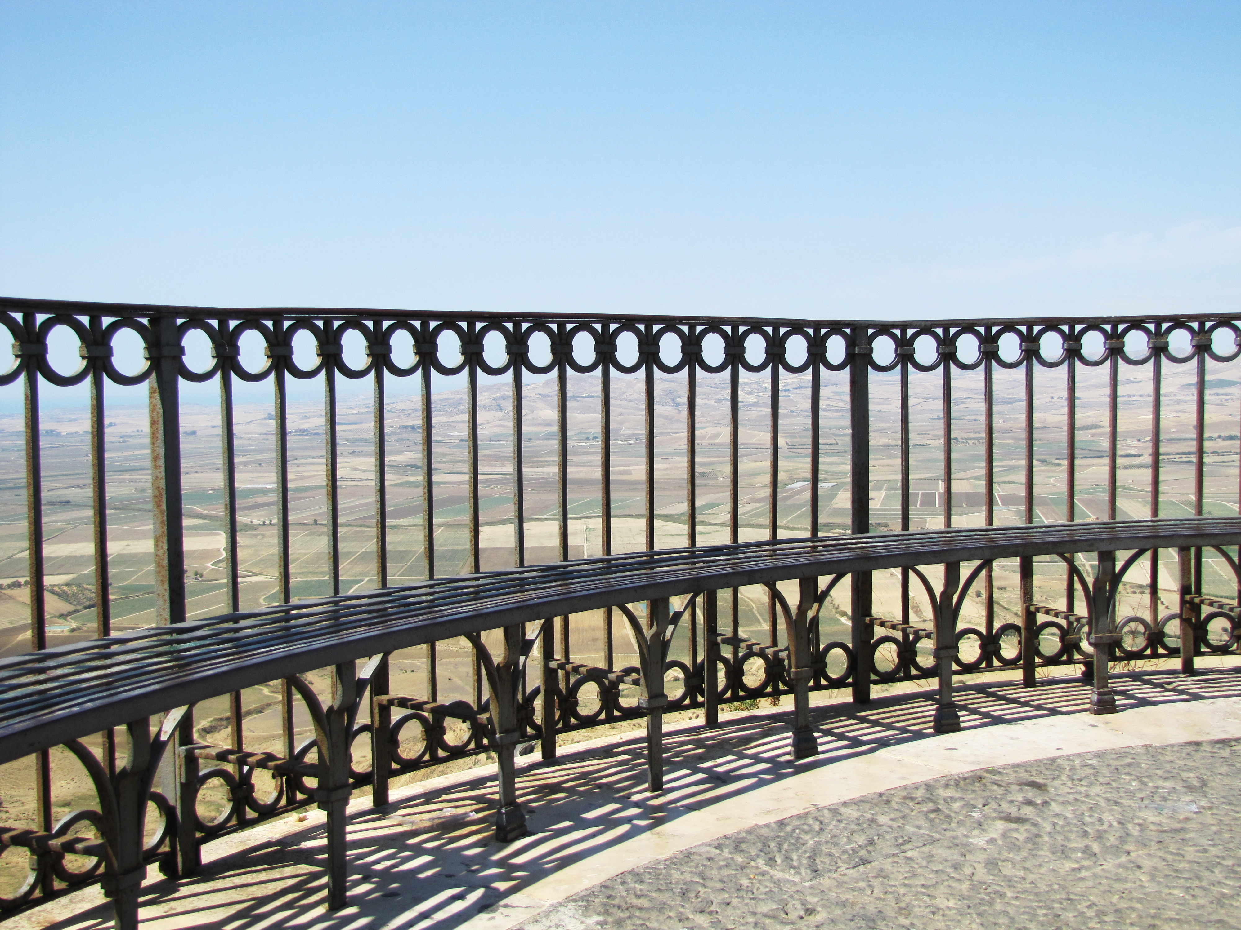 Terrazzo del Belvedere This is a photo of a monument which is part of cultural heritage of Italy.